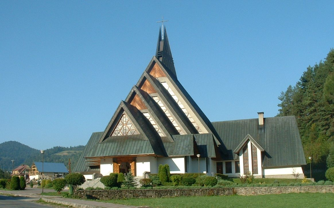 Kościół Wniebowzięcia N.M.P. w Ochotnicy Górnej (1979-89)